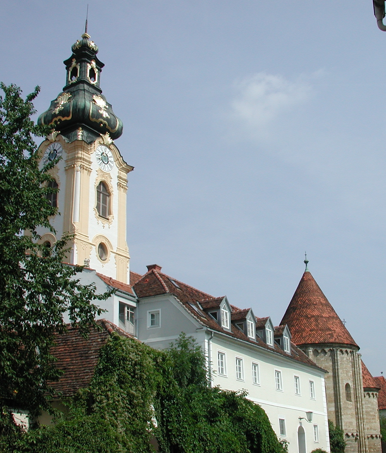 Kirche und Karner in Hartberg